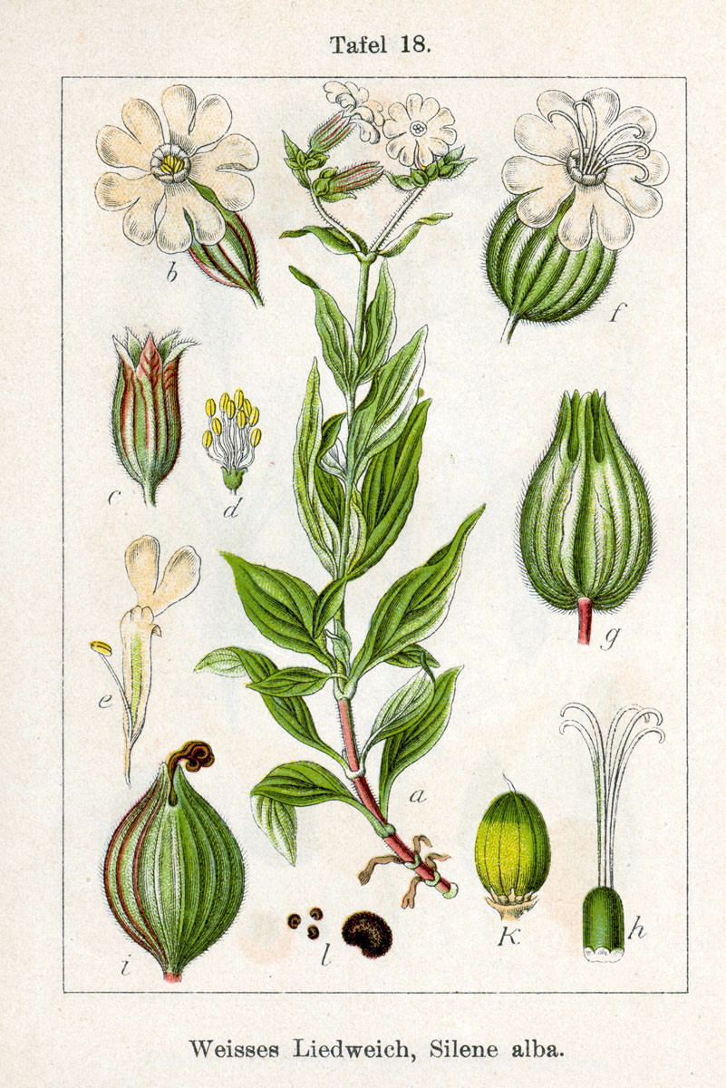 Silene latifolia subsp. alba (Mill.) Greuter & Burdet, syn. Silene alba (Mill.) E.H.L.Krause Original Description Weisses Liedweich, Silene alba